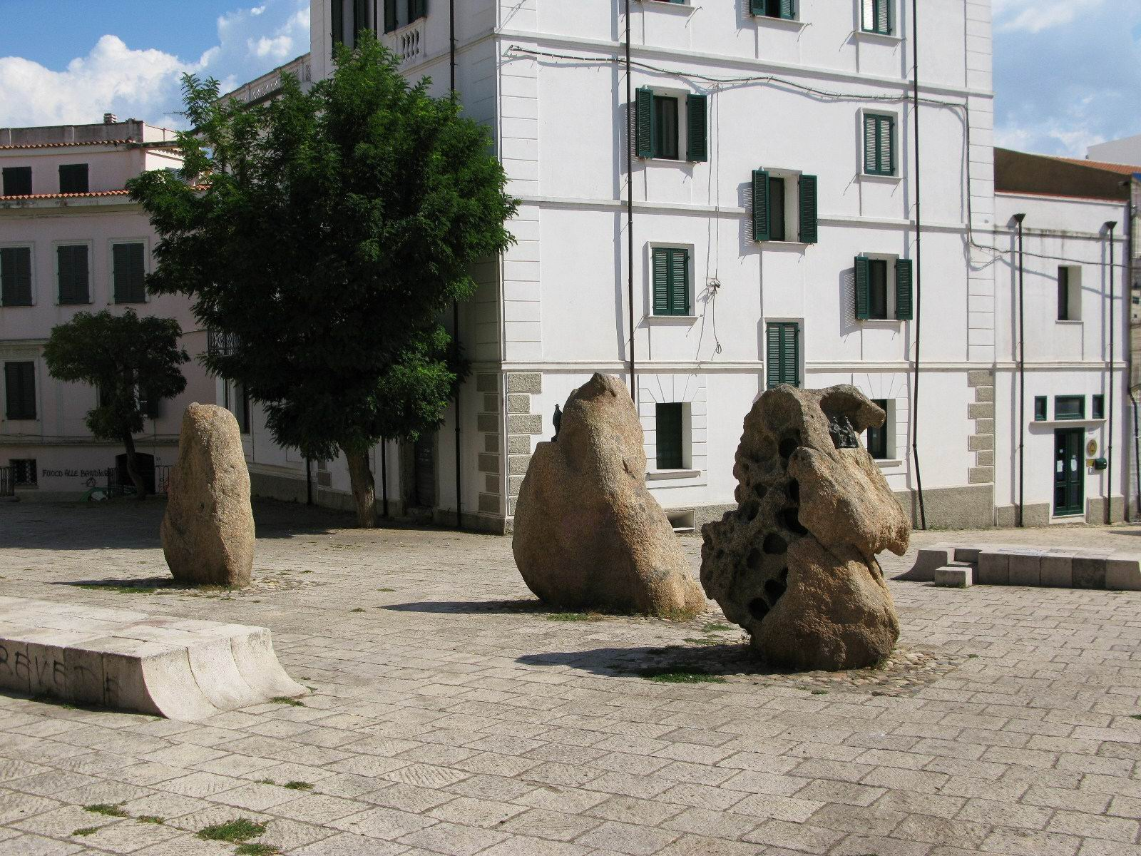 Piazza S. Satta a Nuoro - opere di Costantino Nivola